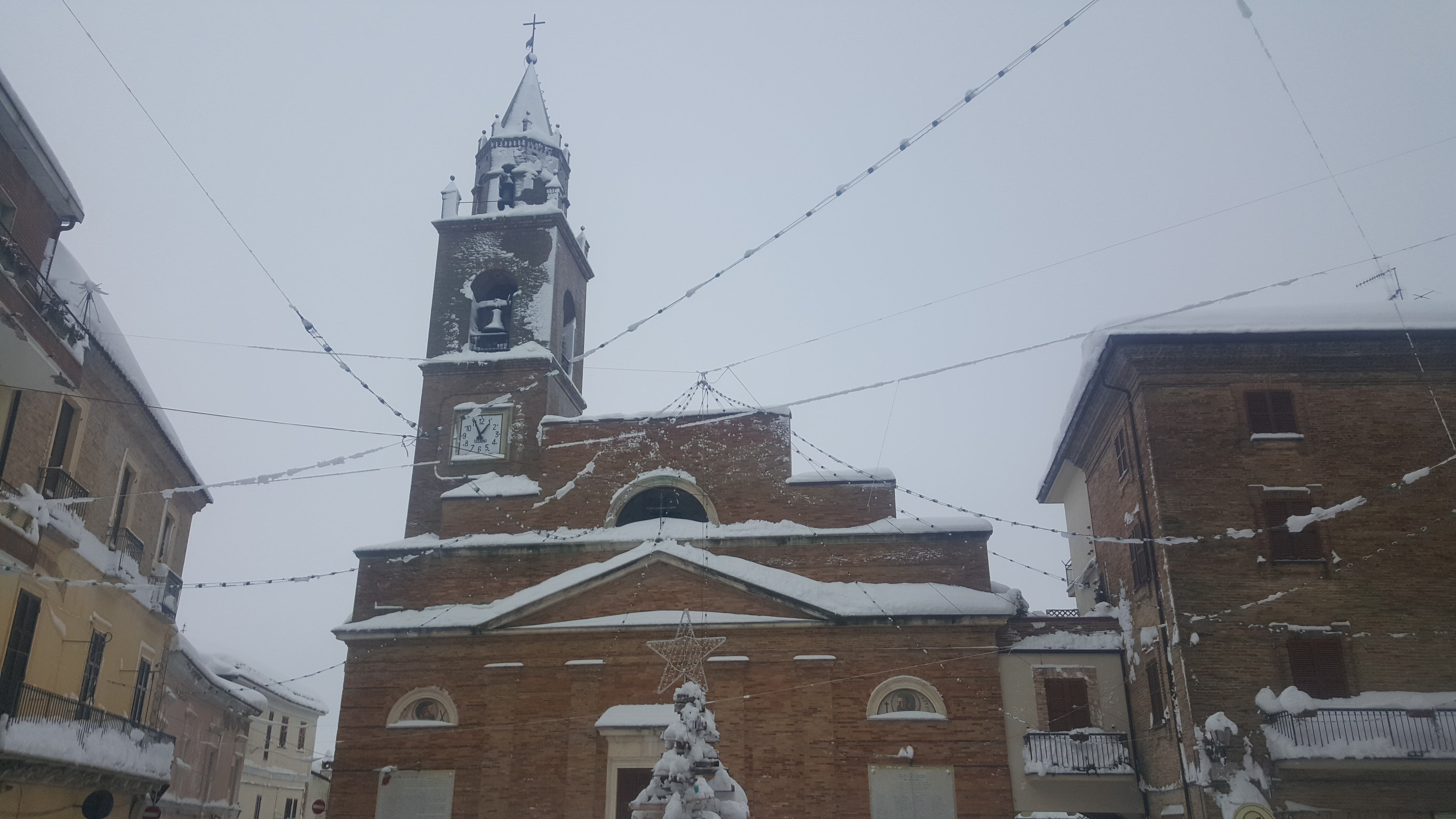 Chiesa principale di Notaresco, santi Pietro e Andrea.